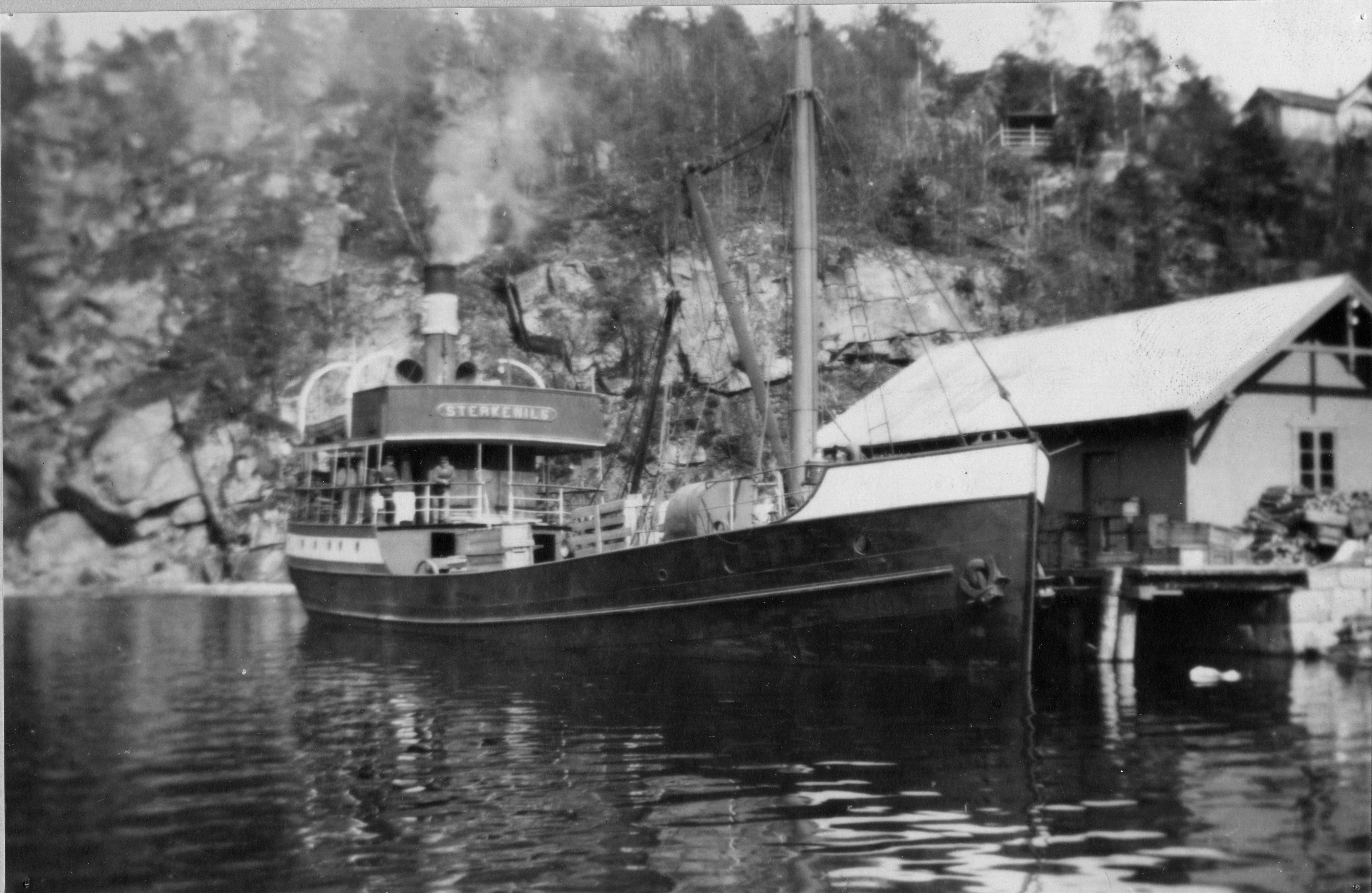 Bildet er hentet fra Arkivverket. D/S Sterke Nils 1913-1922, 171 b.rt. Bygget i 1913 v Aker M.V, solgt i 1922 Arkivinstitusjon : Statsarkivet i Kongsberg Arkivnavn : Skien -Telemarkens Dampskipsselskap Sted : Norge, Telemark, , Emneord: Telemarkskanalen, Båt, Sluser Avbildet